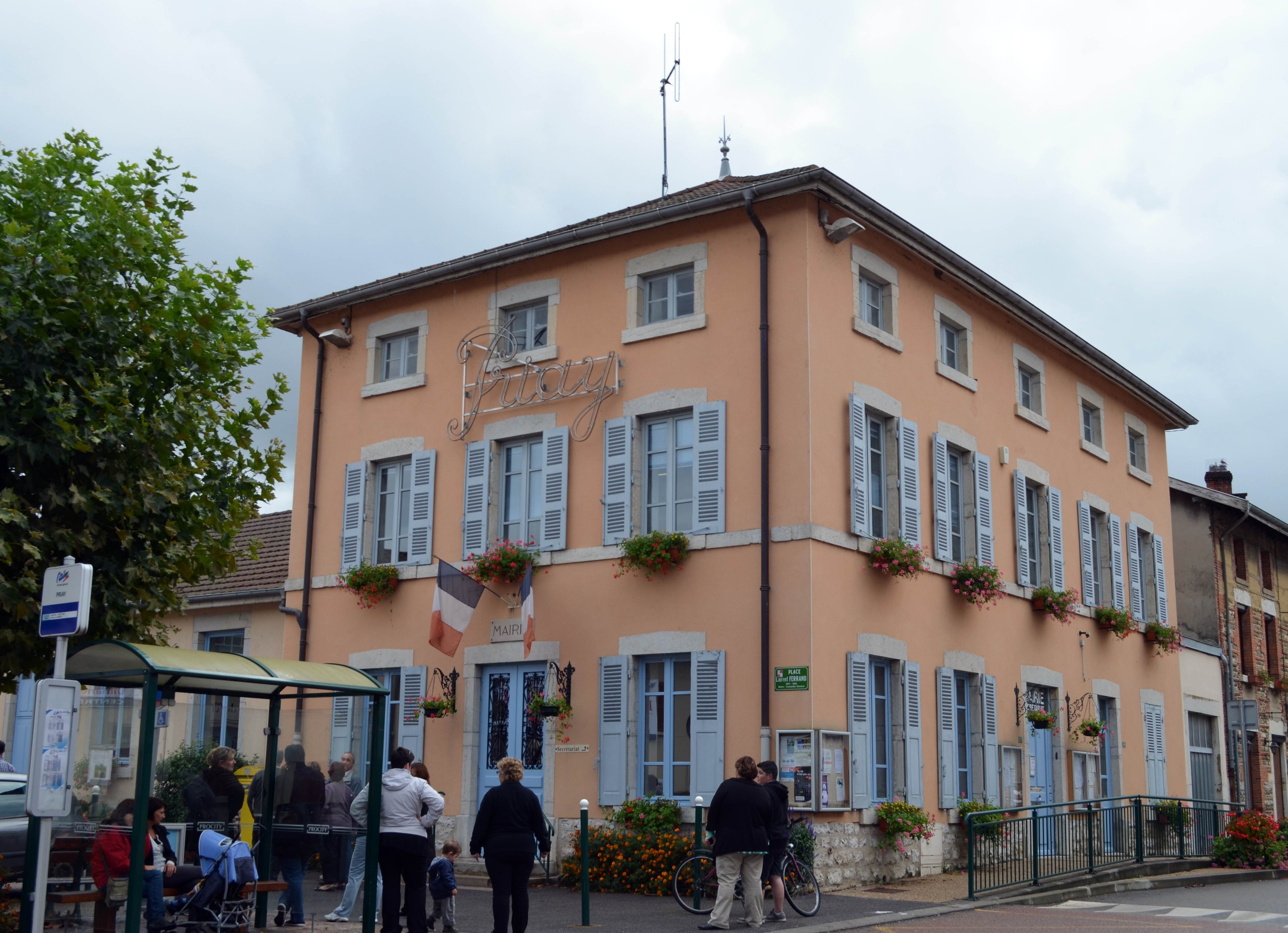 Mairie de Priay.